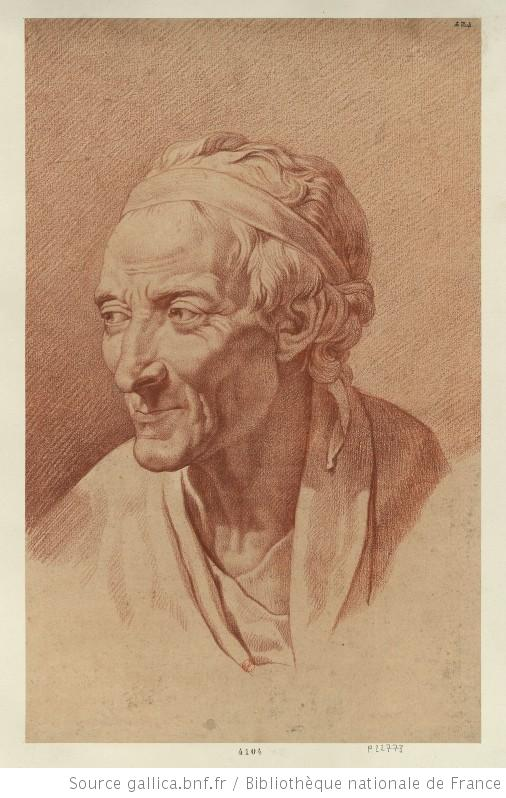 Buste de Voltaire par Houdon. Dessin non identifié.